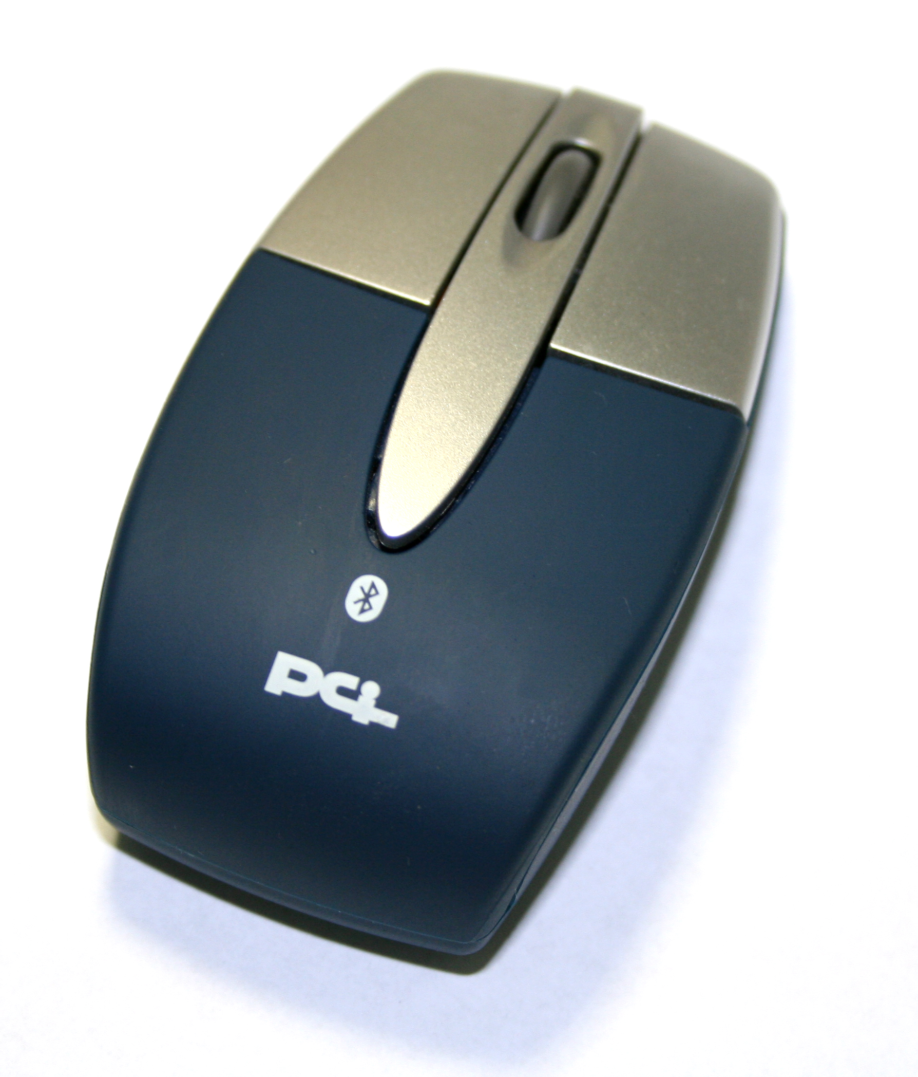 一支藍芽滑鼠，Weihao.chiu拍攝的圖像。